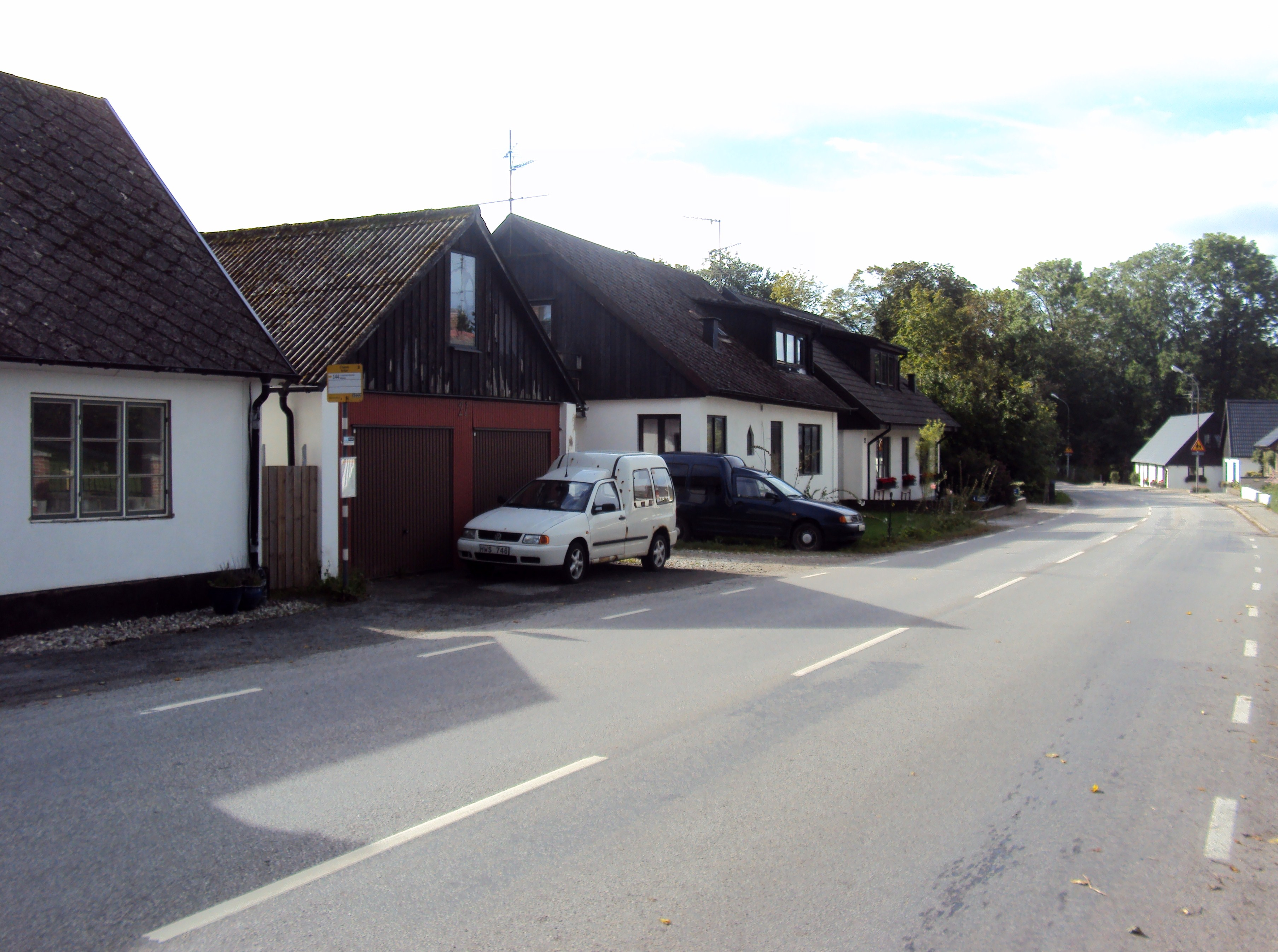 Östra Grevie bygata